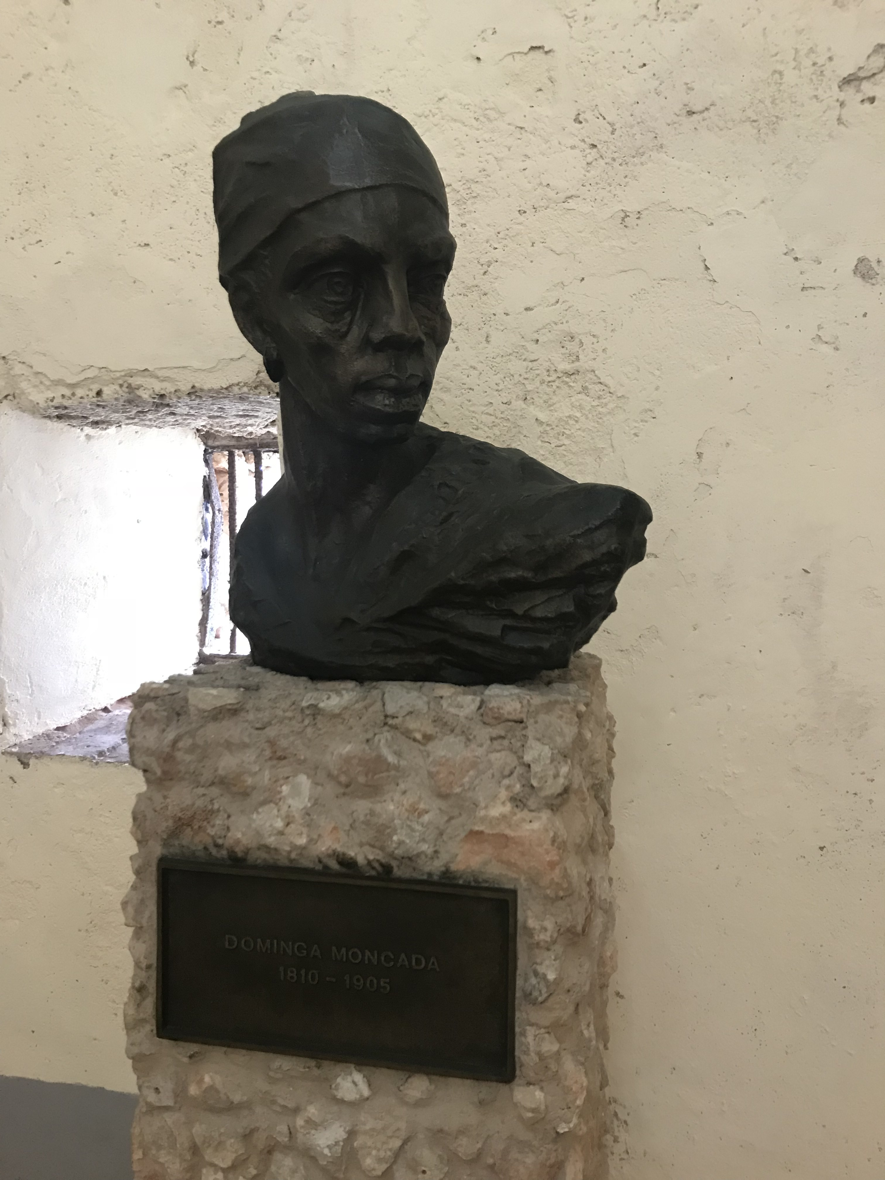 Busto de Dominga Moncada. Situado en el Castillo San Pedro de la Roca, Santiago de Cuba.